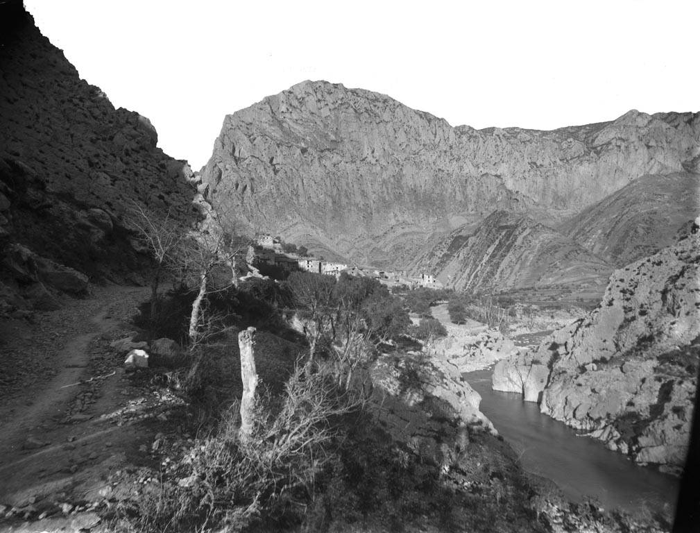 Imatge